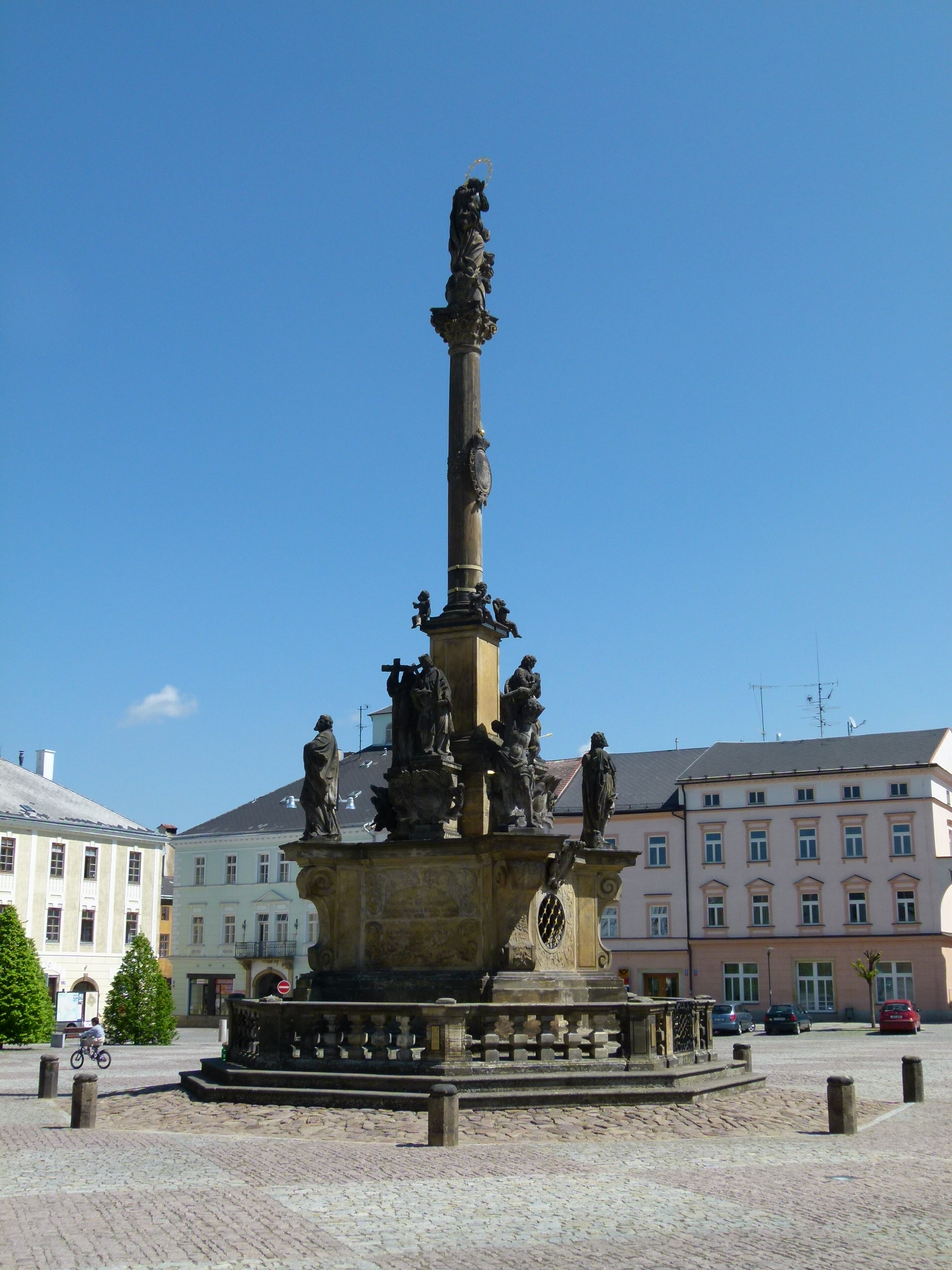 Sloup se sousoším - Morový sloup (Moravská Třebová), Nám. T. G. Masaryka, Moravská Třebová